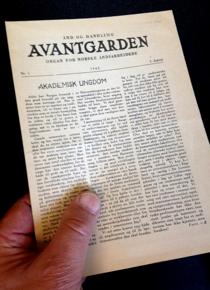 Den illegale avisen Avantgarden, nummer 1 1945.